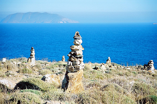 Titel: Historische bakens voor zeevaarders Locatie: Anafí, Griekenland Datum: juni 2004 Fotograaf: Gebruiker:IMFJ